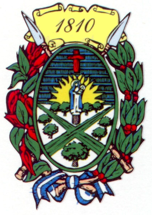 Forma oval, cordato. Partido en dos campos, El superior en azul e inferior en blanco. En la parte superior una cruz en rojo, que significa, valentía, intrepidez, victoria con sangre. En el plano inferior nueves algarrobos, existentes en el lugar desde épocas remotas. El gran sol significa el momento en que surge a la vida urbana, definitivamente organizada y regularizada en su fundación por el Gral. Manuel Belgrano, la ciudad de Ntra. Sra. del Pilar de Curuzú Cuatiá. En el campo inferior dos caminos se cruzan y en el ángulo superior aparece un pilar con un hueco y sobre él la Virgencita del Pilar ante la cual oficiara Misa el Capellán del Ejército del Norte el 16 de noviembre de 1810. Orla el escudo ramas de ceibo y laurel que representan el sentimiento nacional siempre presente en este pueblo las gestas heroicas de la Patria. Dos lanzas correntinas de tacuares y chuzas lo sostienen y simbolizan las armas de la época en que se luchaba por la Independencia. En su escudo de armas, Curuzú Cuatiá refleja su tradición, su prosapia y su historia